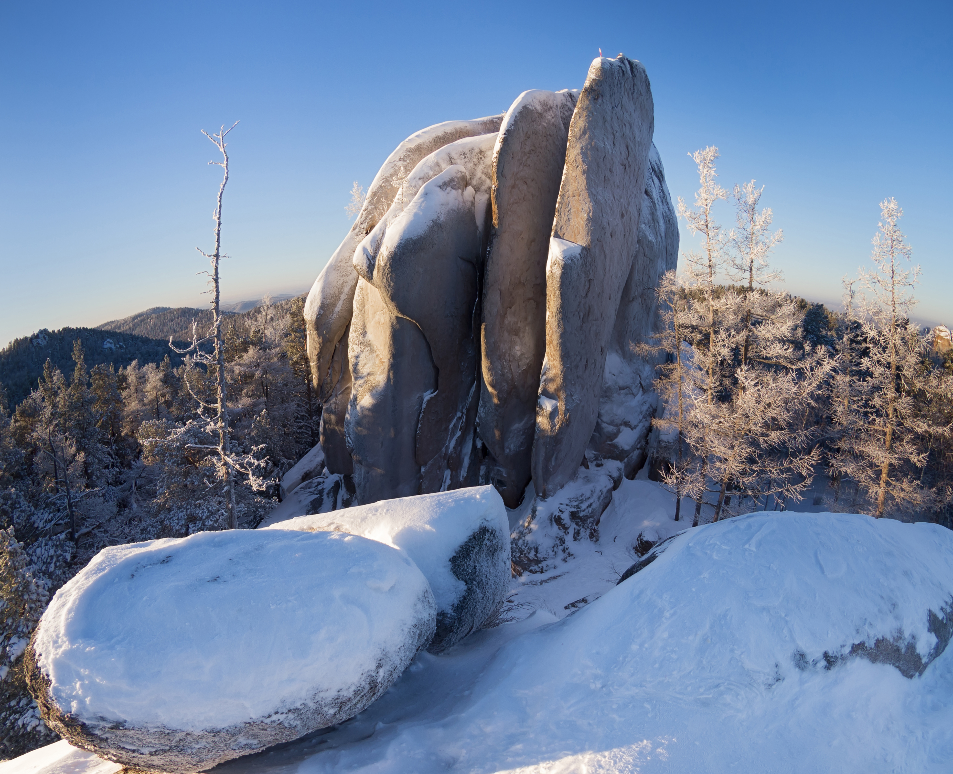 Красноярский заповедник "Столбы", скала "Перья". This image is related to the protected area of Russia number 2400031